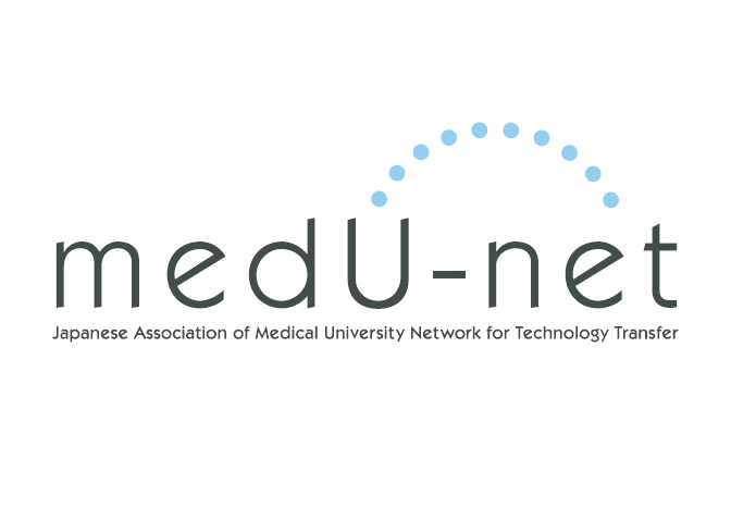 medU-netシンボルマーク